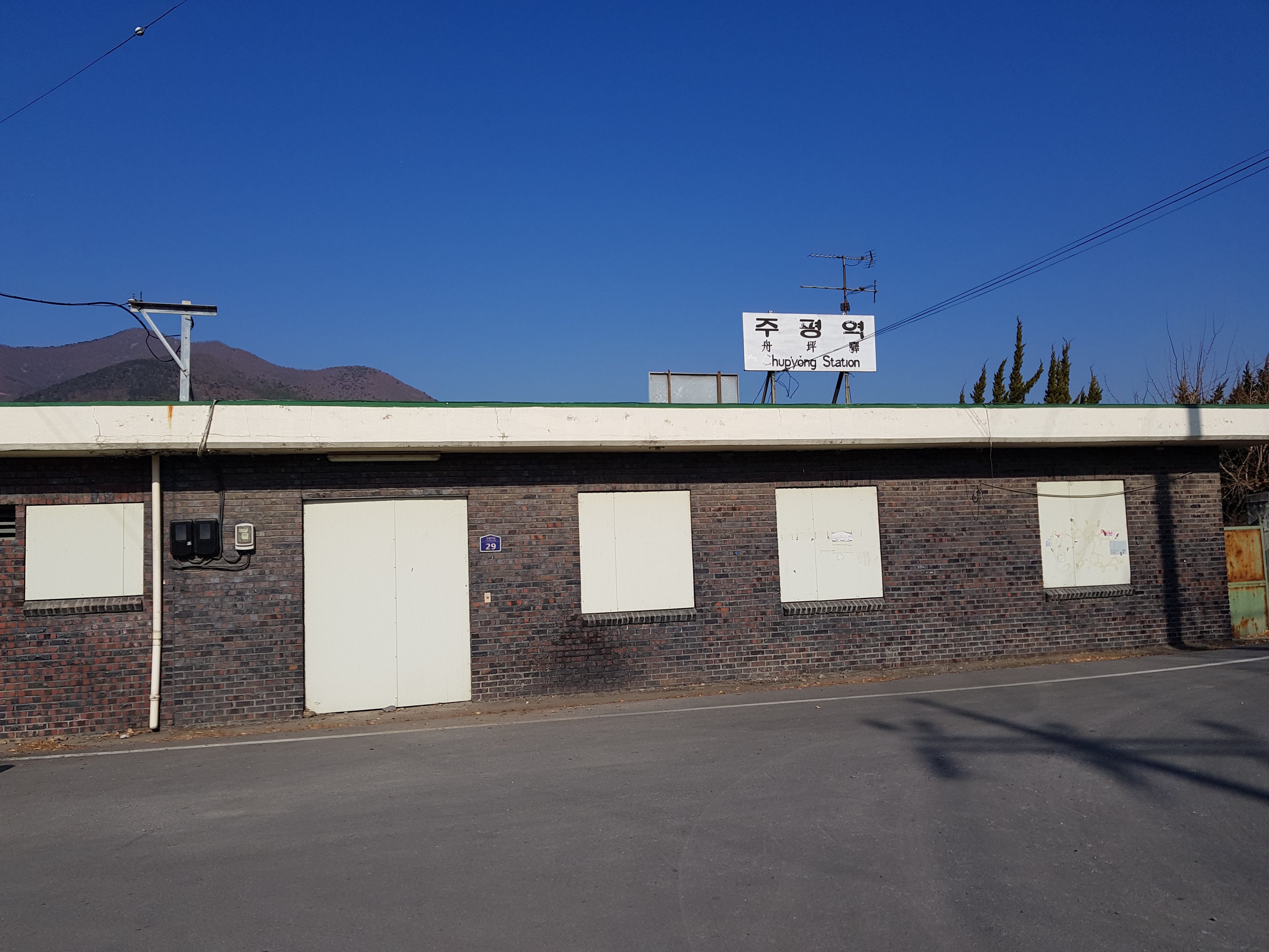 2019년 12월 28일의 문경선 주평역 역사.